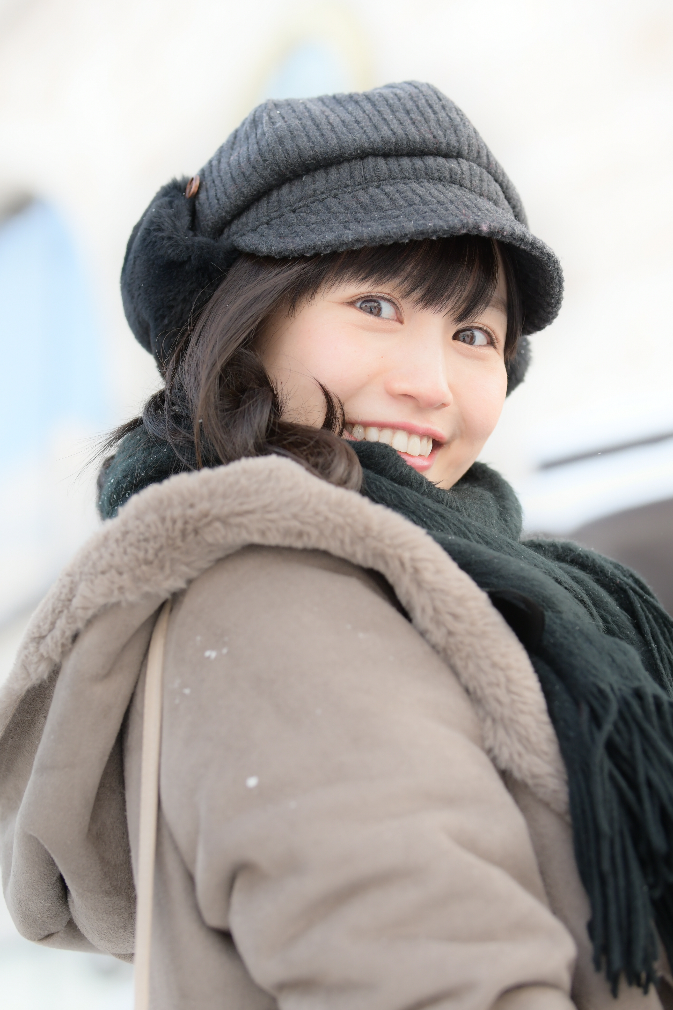 ソーシャルアイドル「notall」の佐藤遥さん（“北海道はでっかいどう〜ノタルと小樽ツアー〜”にて撮影）